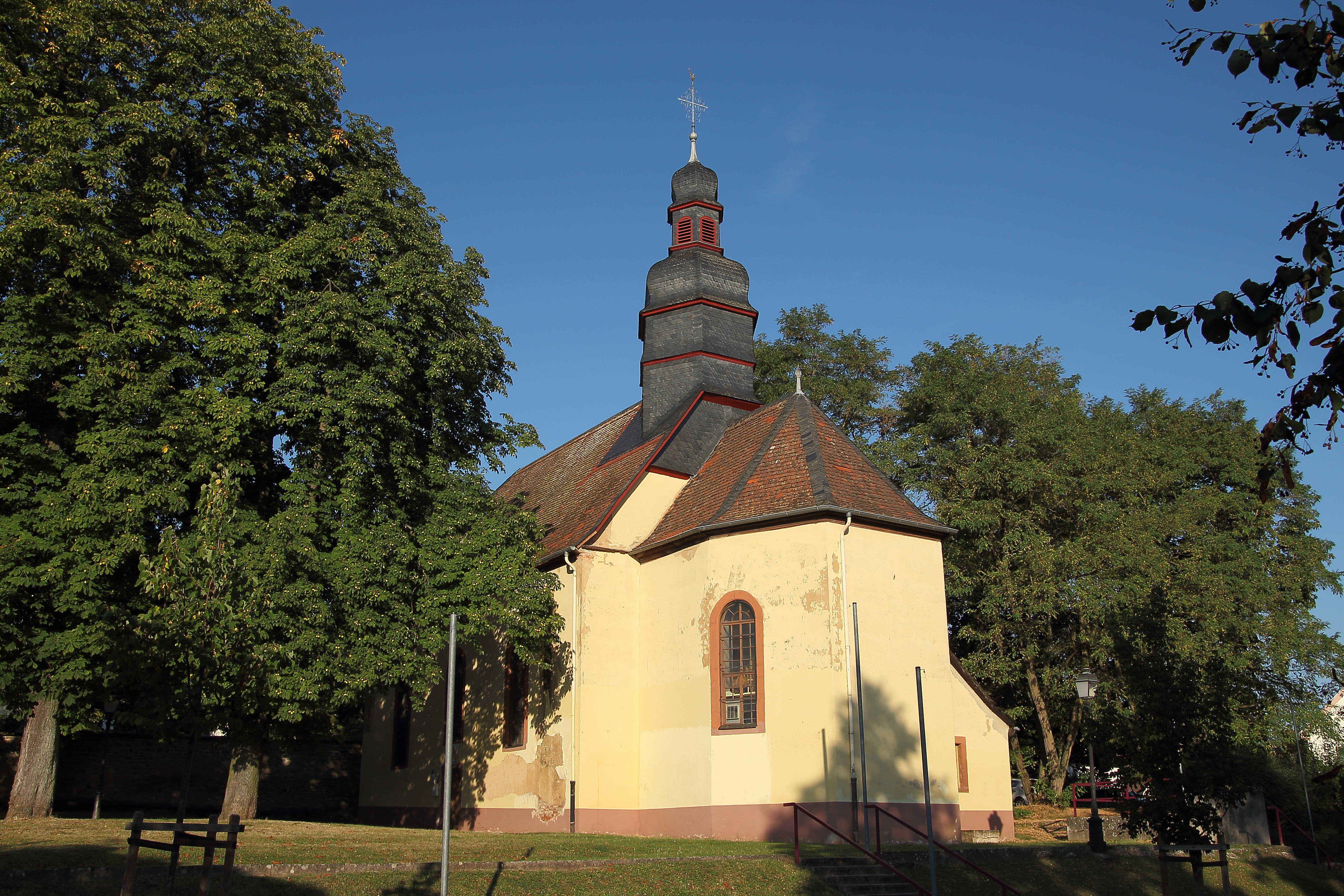 Ehemalige Liebfrauenkirche in Kirchheimbolanden, jetzt als Begegnungsstätte und für Seminare genutzt. Davor beheimatete die Kirche die Bogenschützenabteilung des Schießsportvereins für einige Jahre.